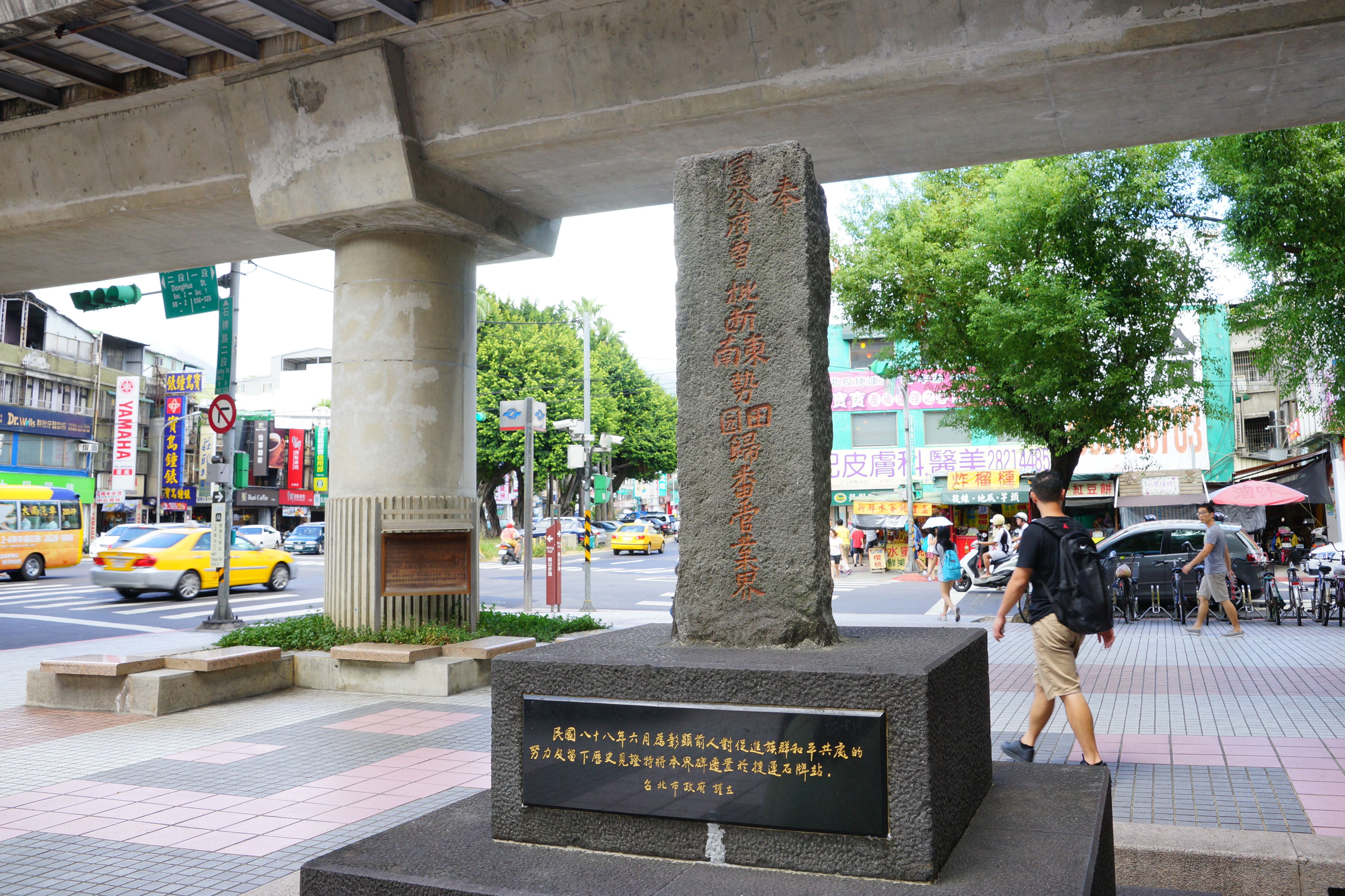 台北捷運石牌車站外的石牌界碑，1999年（中華民國88年）6月臺北市政府遷置，碑文的內容為「奉憲分府曾批斷東勢田南勢園歸番管業界」。